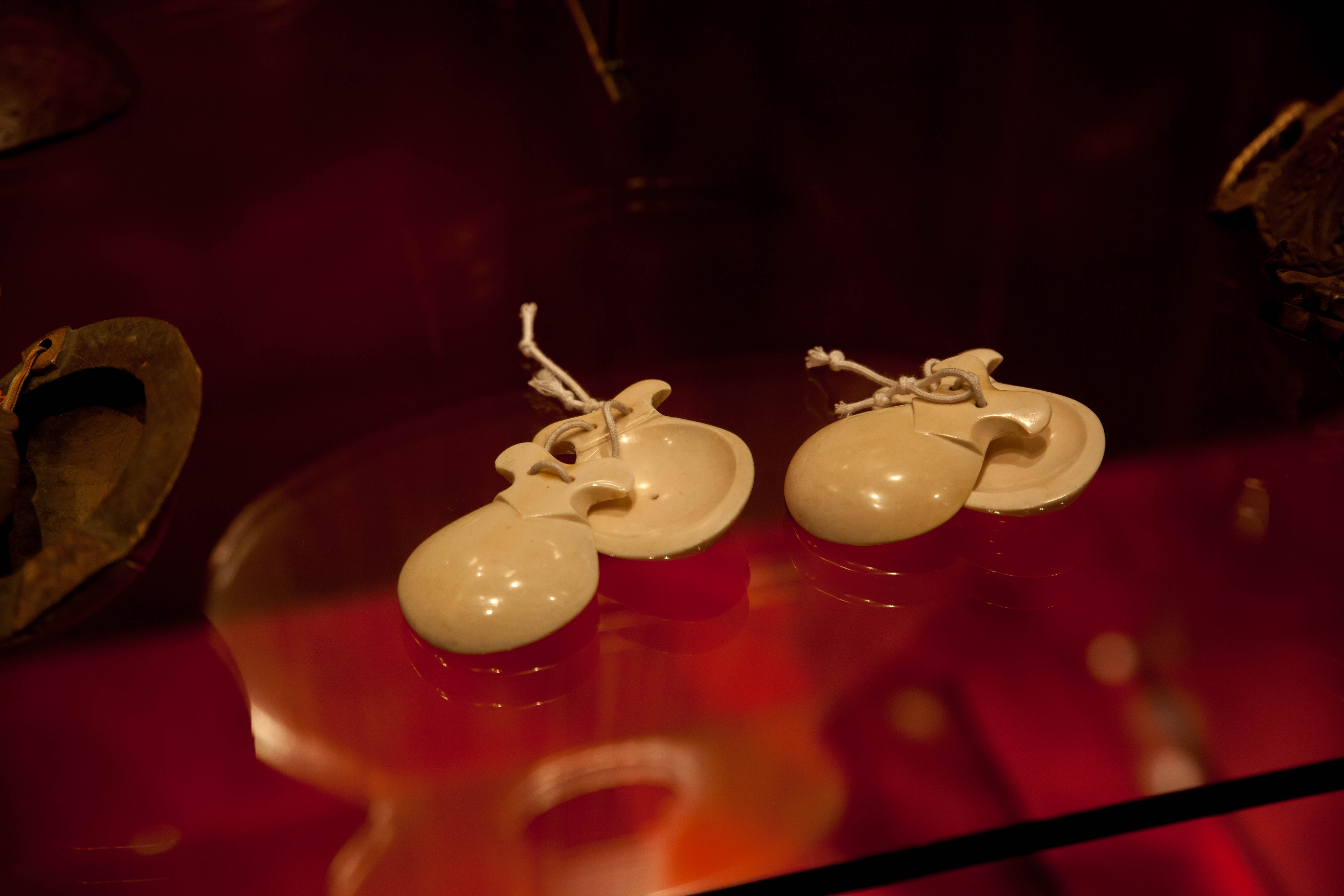 Castanyoles d'ivori, MDMB 206, Museu de la Música de Barcelona